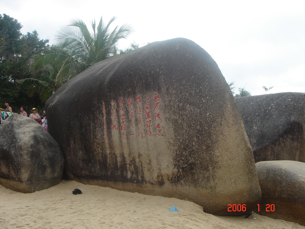 中国海南省三亚市天涯海角风景旅游区内一景，风景区内到处可见文人墨客的手迹